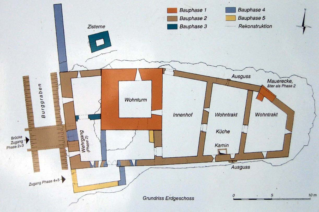 im Palas